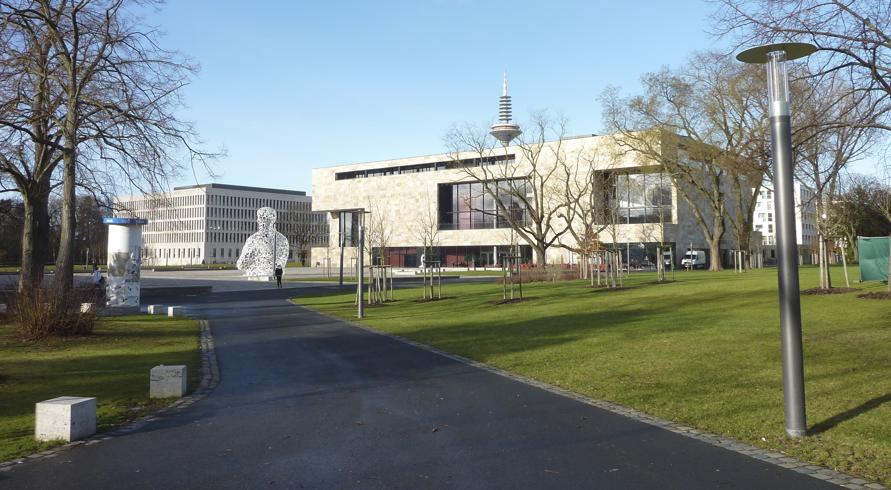 Stadt Frankfurt am Main, Johann-Wolfgang-von-Goethe-Universität: Ansicht des Uni-Campus Westend im Stadtteil Westend-Nord. Das Foto zeigt den Campusplatz; in der Bildmitte das Hörsaalzentrum („HSZ“). Im Bildhintergrund die Spitze des Europaturms. Ansicht von Südosten.